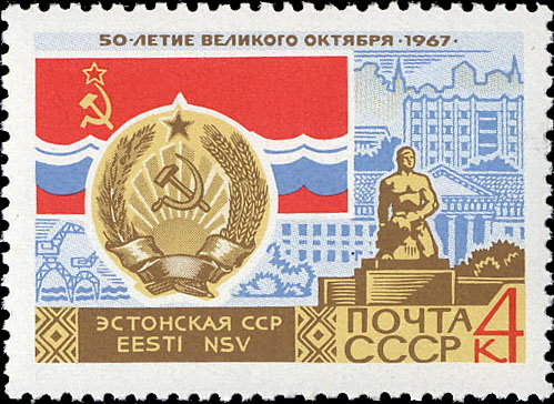 Почтовая марка СССР к 50-летию Октябрьской революции. Эстонская ССР. Таллин.